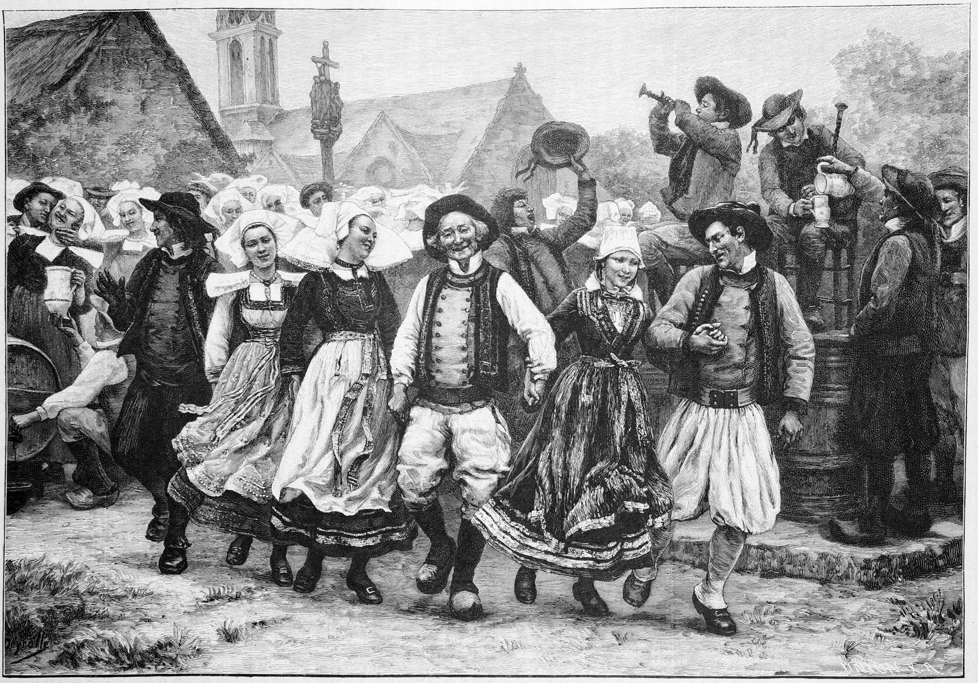 Bretonische Gavotte tableau de Théophile Deyrolle